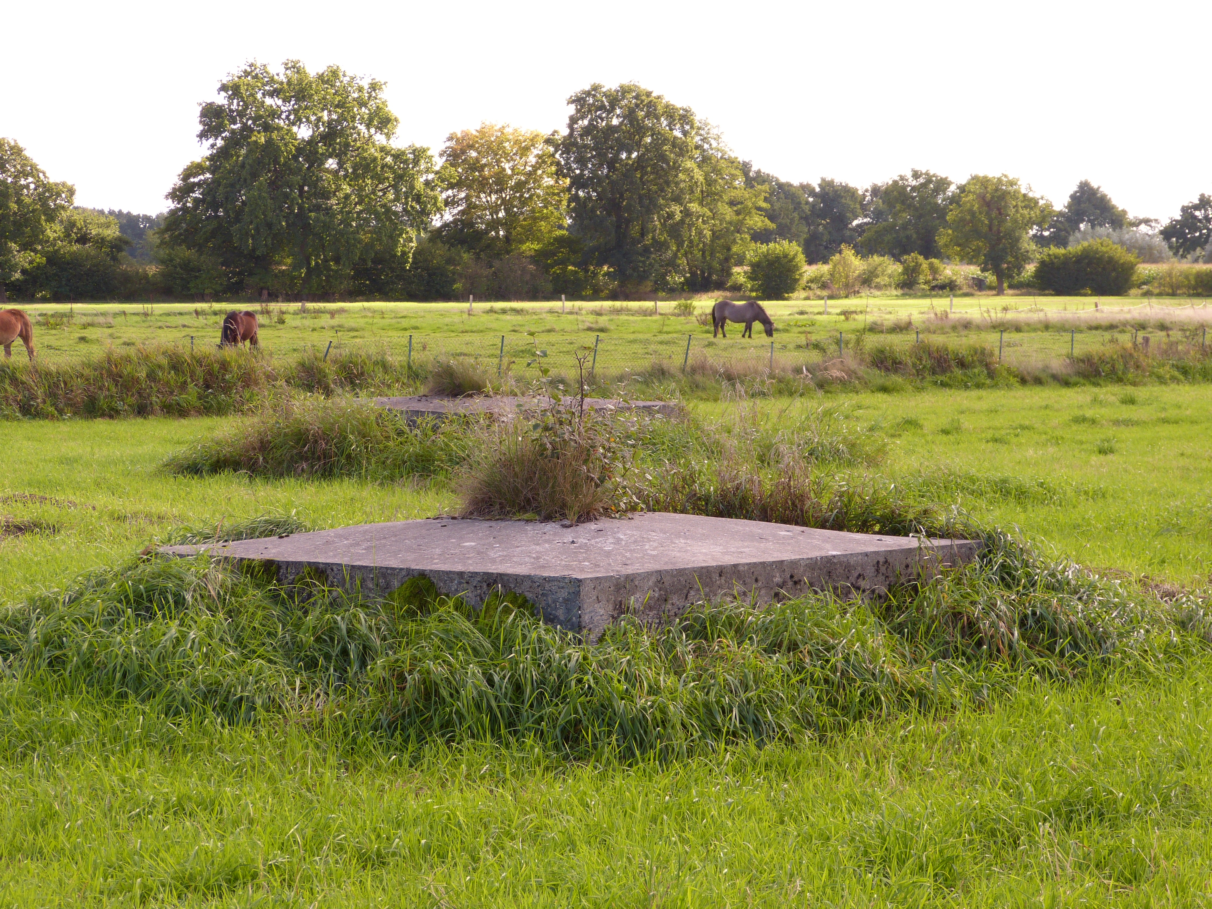 Die Fundamentreste befinden sich auf dem Gelände der ehemaligen Funkstelle Quickborn.